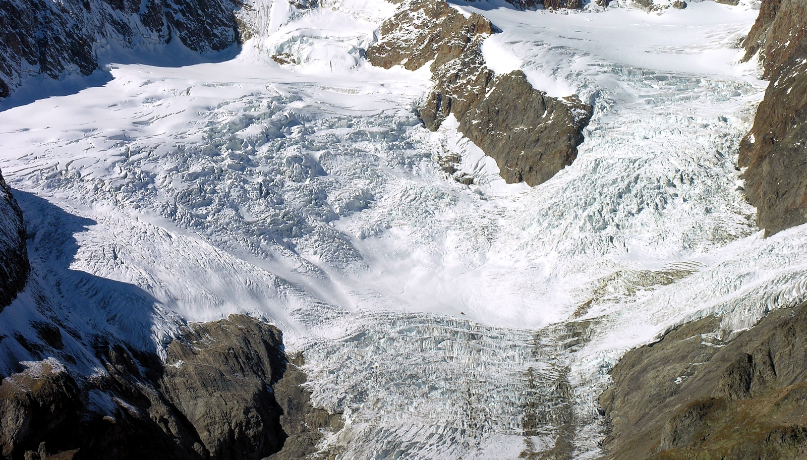 Il ghiacciaio della Lex Blanche - Alpi Graie - Italy